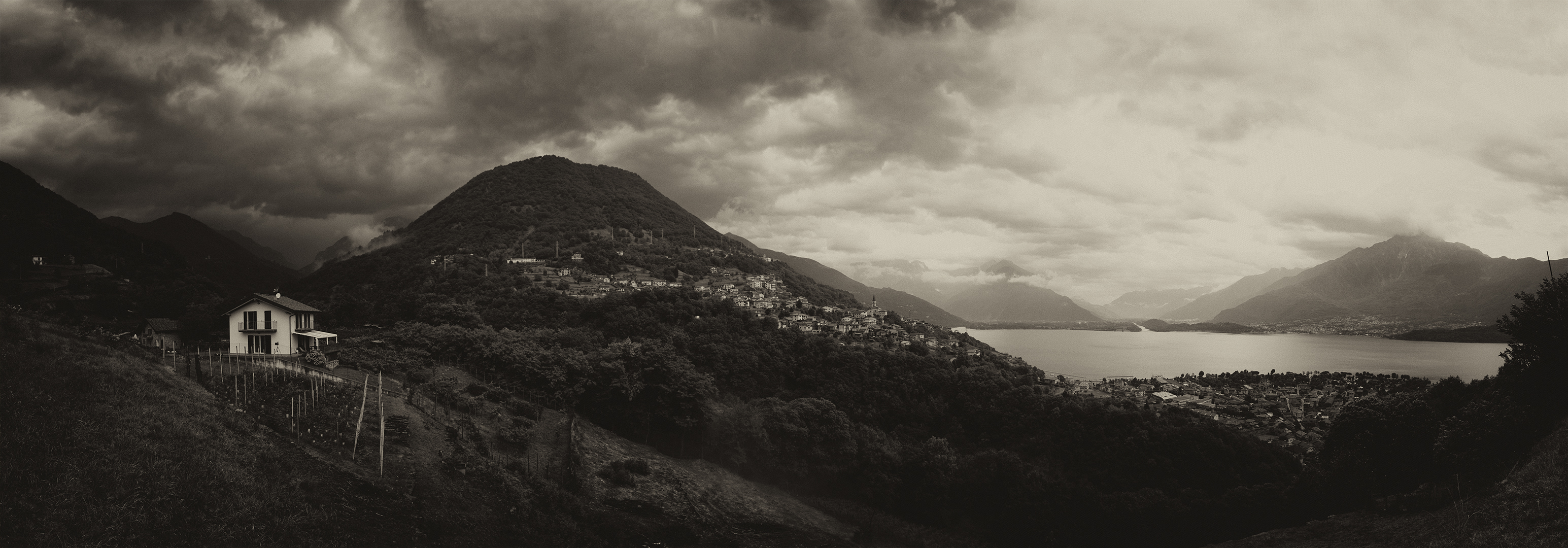 Vercana e Lago di Como